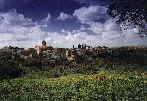 Canneto Sabino